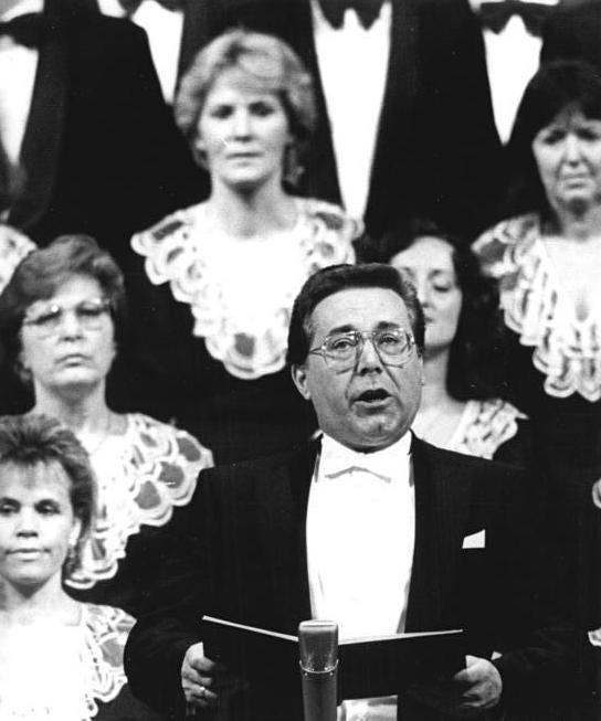 ADN-ZB Link 23.10.87 Berlin: Jubiläum-Staatsakt. Zum Abschluß des festlichen Staatsaktes ertönte Ludwig van Beethovens 9. Sinfonie. Unter den Solisten des Finalsatzes mit der Kantate über Schillers "Ode an die Freude" war Peter Schreier.